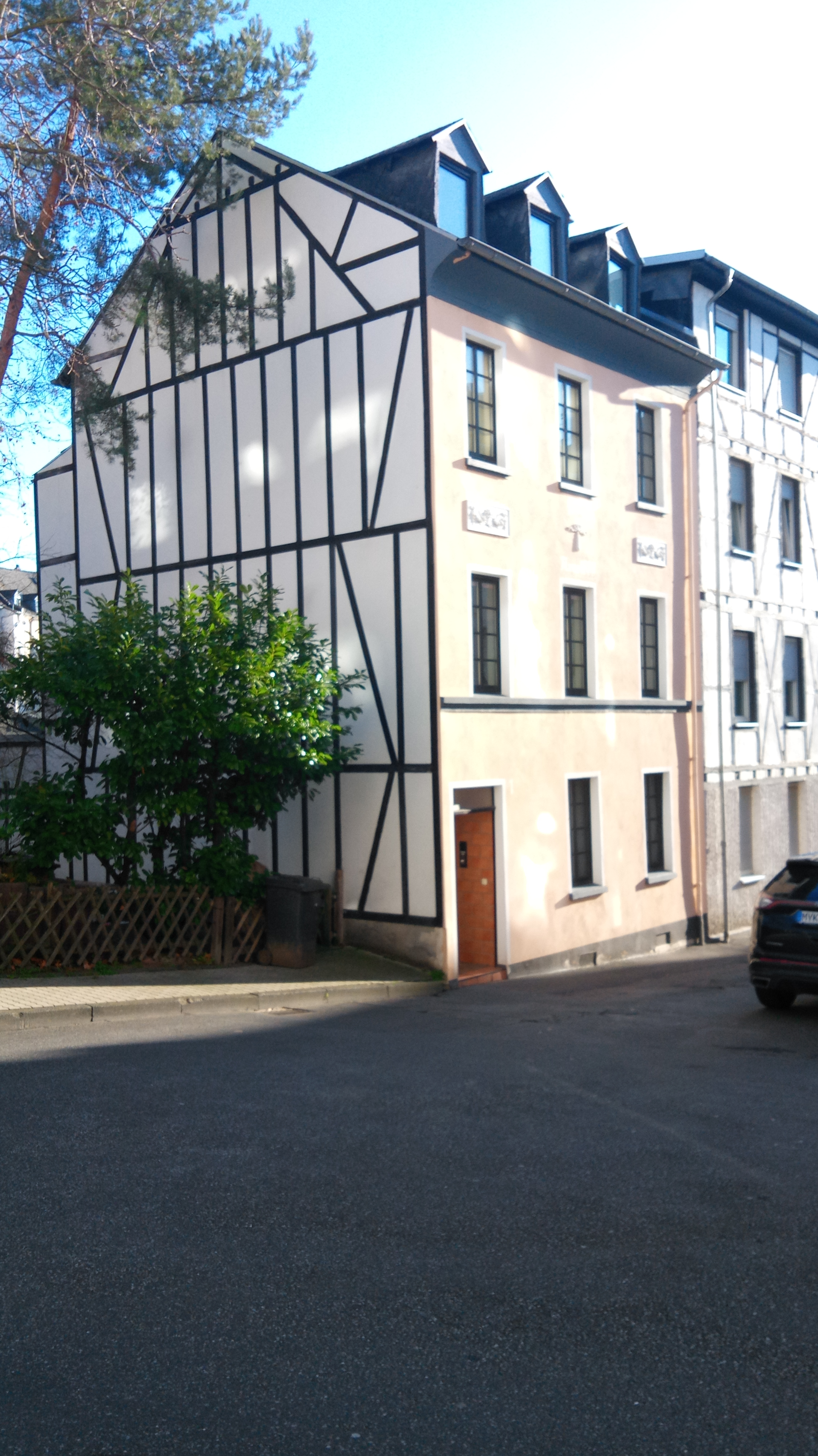 Elisenstraße 1 in Koblenz-Lützel - Es ist Teil der Denkmalzone Elisenstraße 1-9 (ungerade Nummern), Antoniusstraße 16